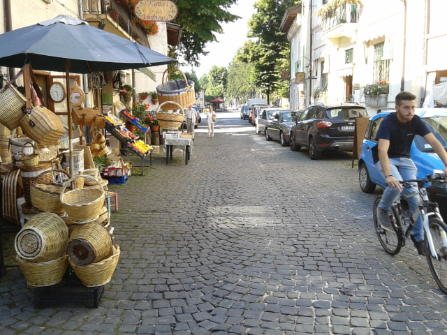 Scorcio fotografico del centro storico